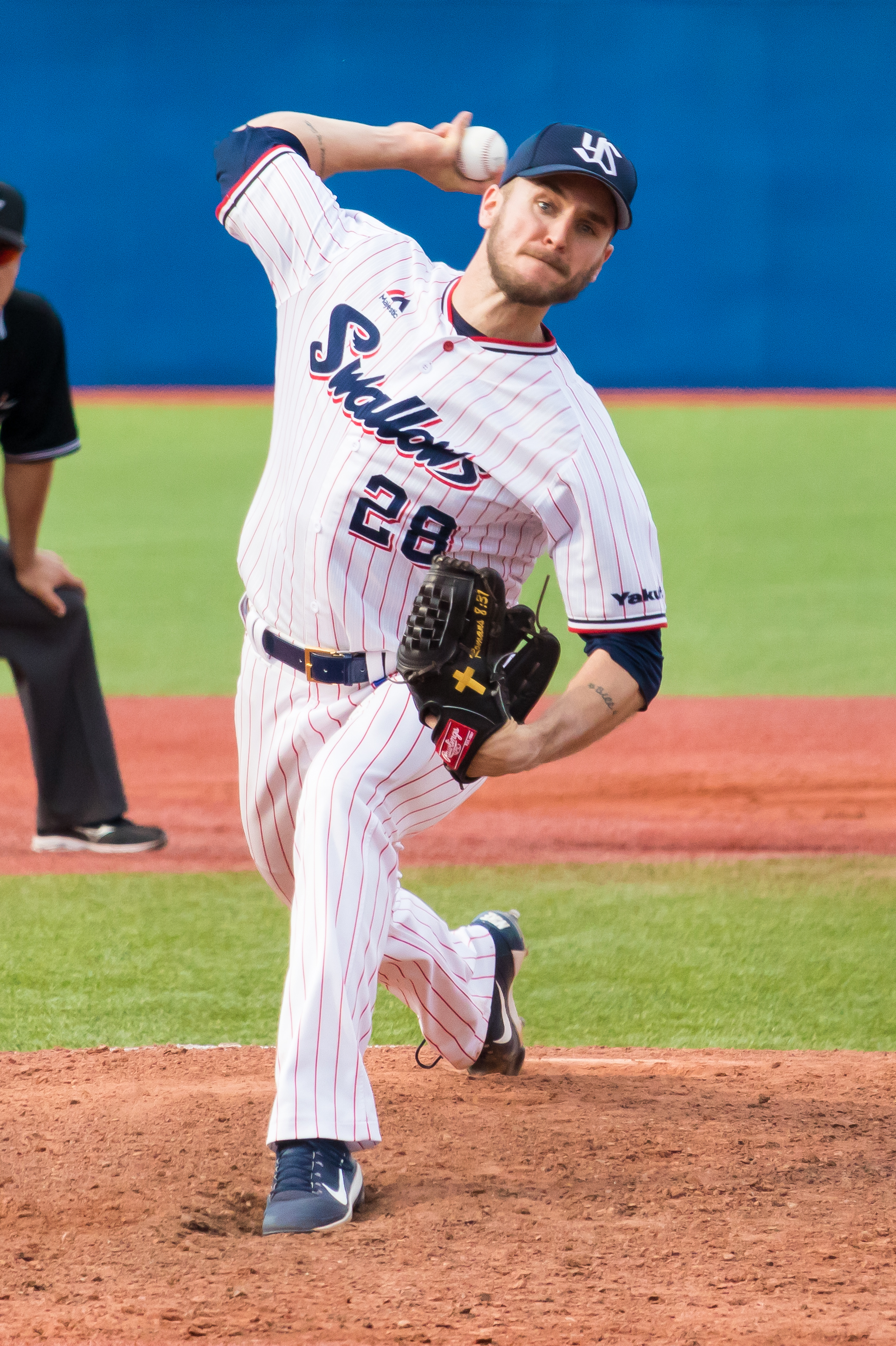 完封勝利のブキャナン。